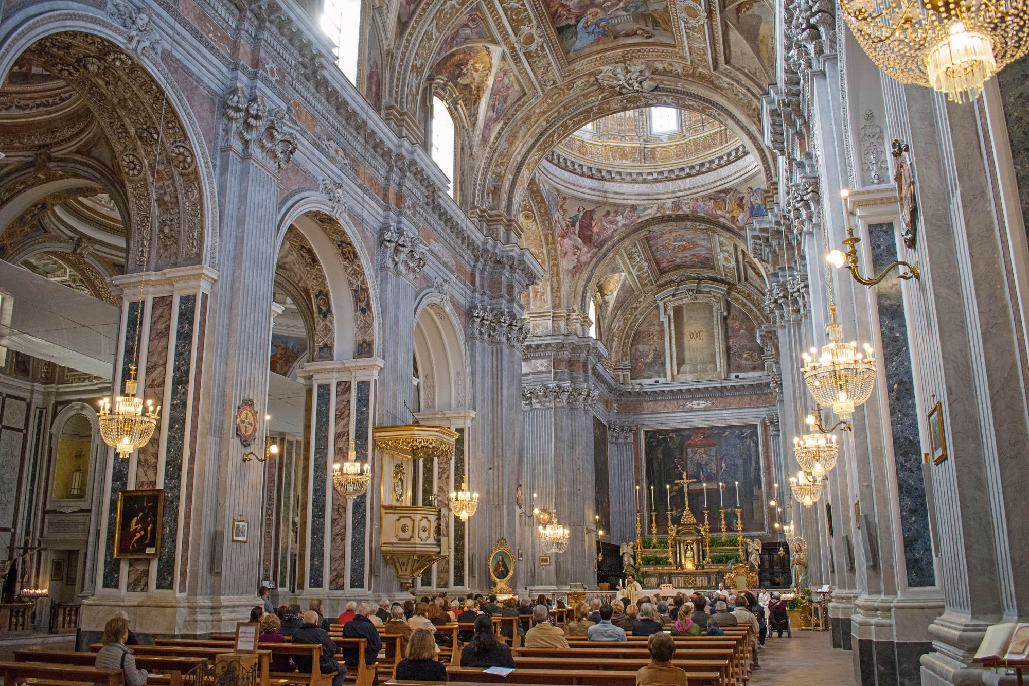 Navata centrale, Santa Maria degli Angeli a Pizzofalcone, Napoli